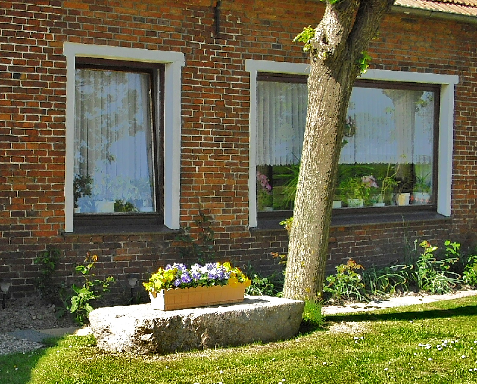 Granitquaderstein vor Bauernhaus in Burmönken; er entstammt der ehemaligen Johanniter-Klosterkirche